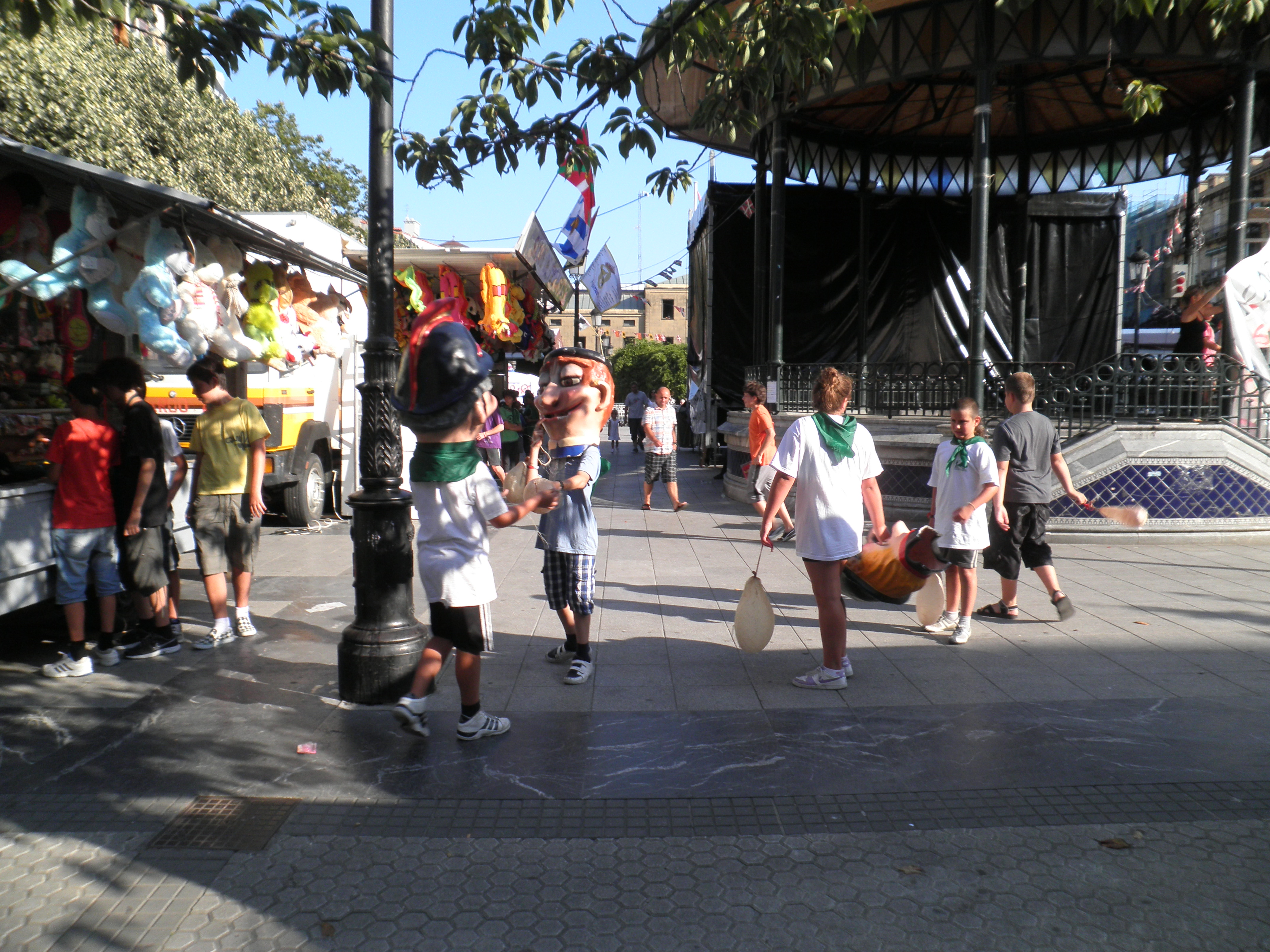 Buruhandiak Amara Zaharrean.